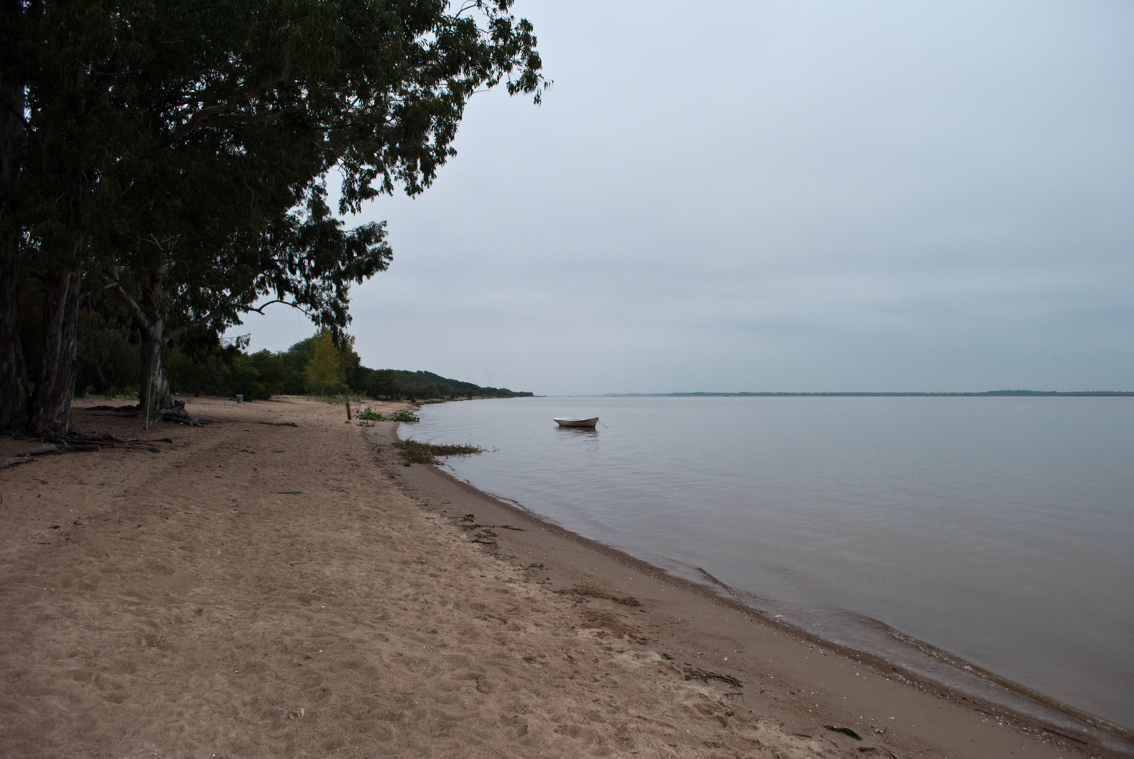 Playa de la Agraciada e Higuerón allí existente, donde desembarcaron los Treinta y Tres Orientales el 19 de Abril de 1825.. Ubicada en el departamento de Soriano